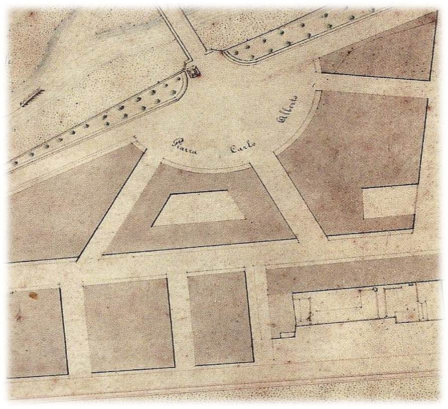 Le plan de la place Charles-Albert, établi à la demande du Consiglio d’Ornato